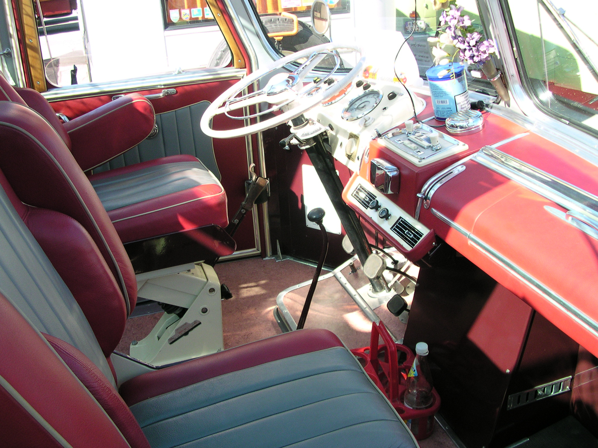 Oldtimer-Treffen bei Daimler-Chrysler in Wörth am Rhein. Mercedes-Benz O 317 Gelenkbus.